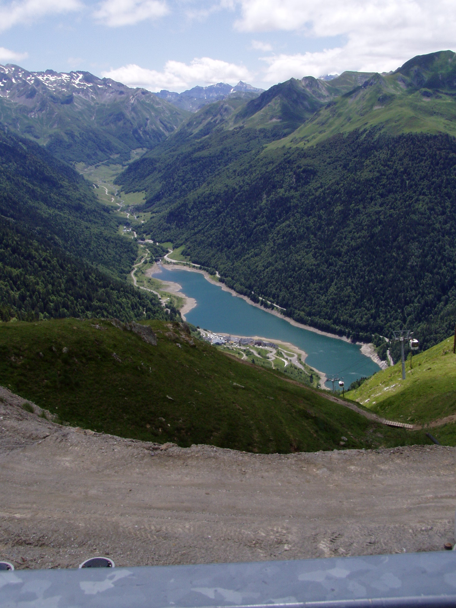 photographie du lac de Fabrèges vu de l'arrivée du télécabine d'Artouste (Pyrénées-Atlantiques)